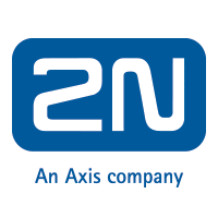 Jedná se o nové logo firmy 2N Telekomunikace, ,které náleží pouze a jedině jí. Se svolením jesem ho mohl použít k editaci na wikipedii.